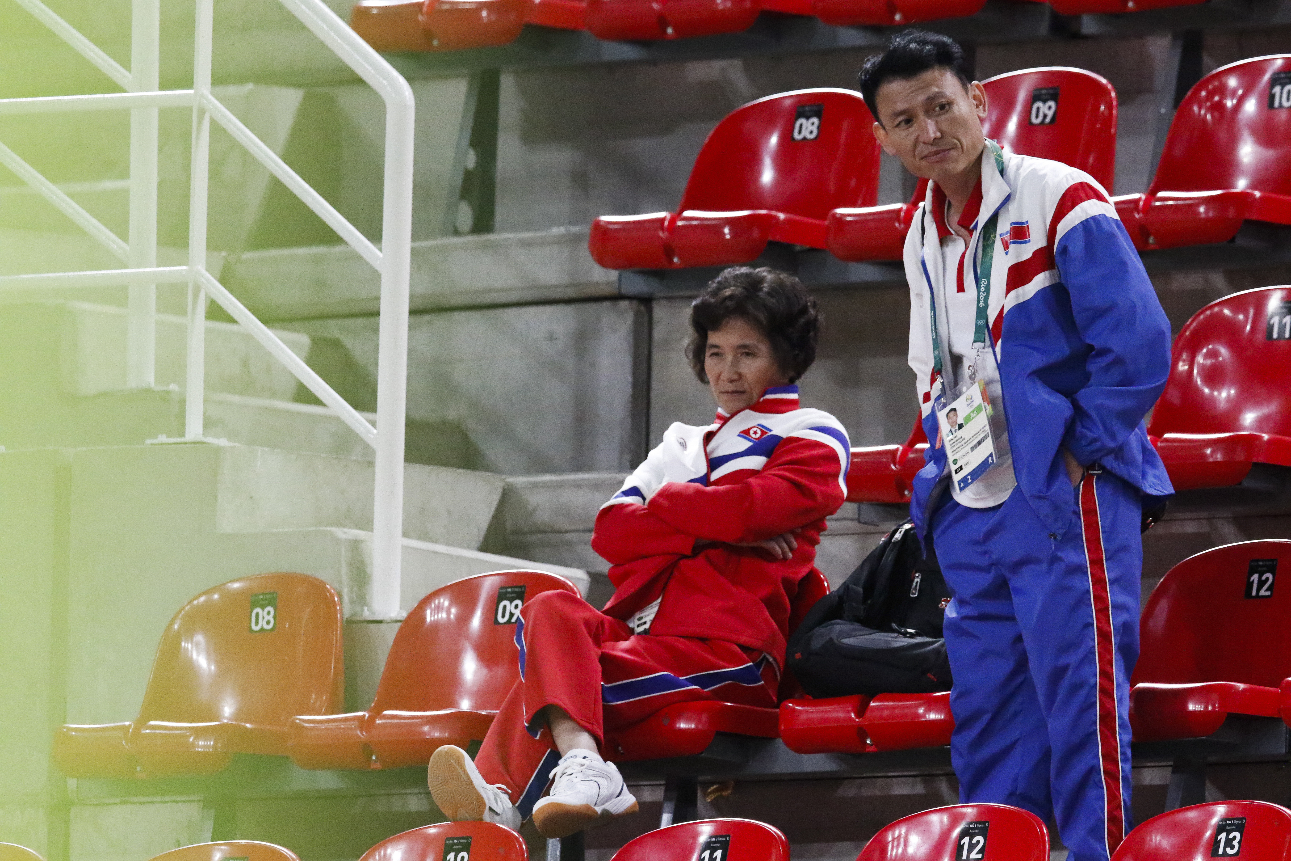 Rio de Janeiro - Representantes da Coréia do Norte filmam o treino de Simone Biles, estrela do time de ginástica artística dos Estados Unidos, na Arena Olímpica dos Jogos Rio 2016 (Fernando Frazão/Agência Brasil)